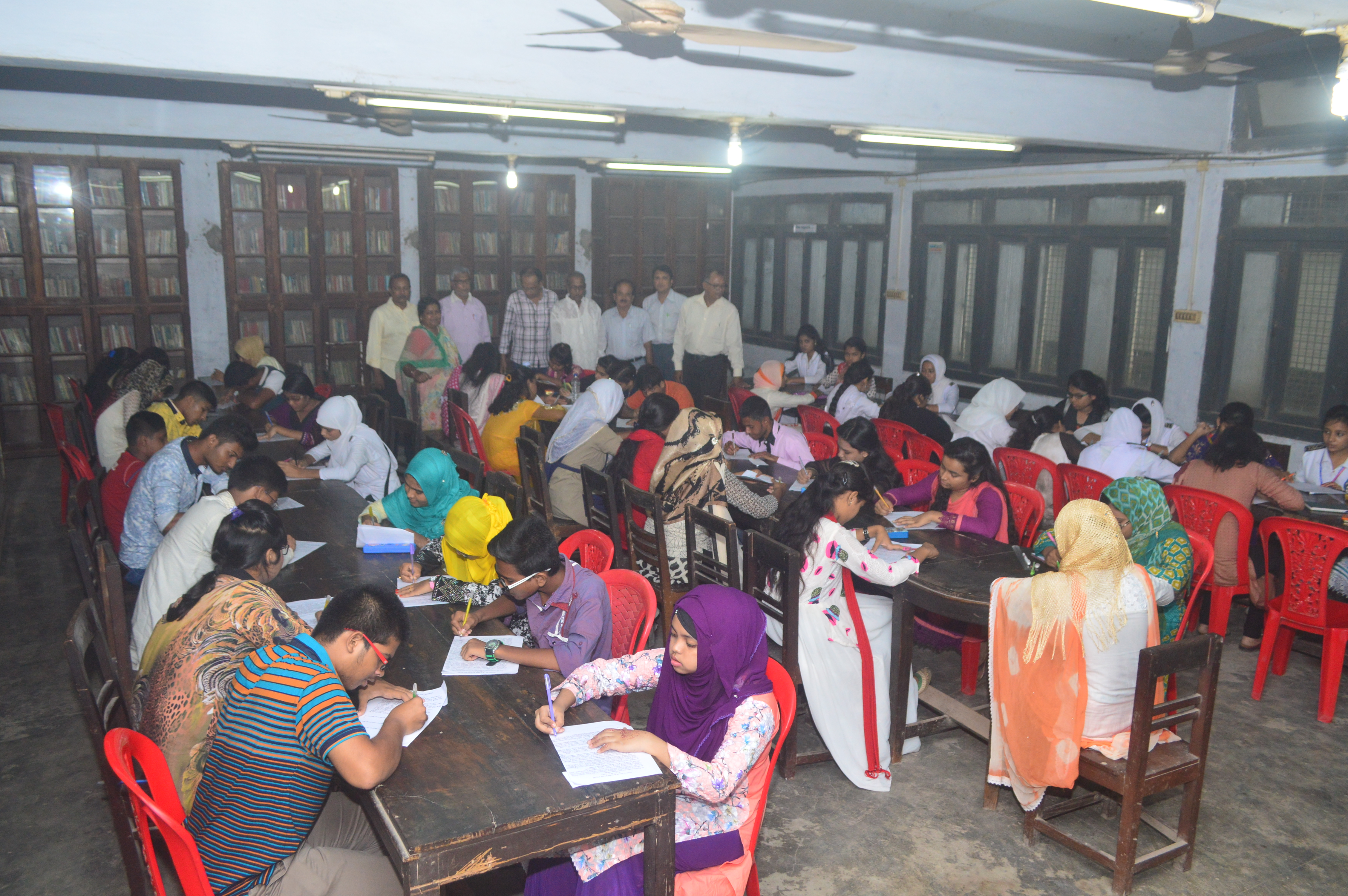 যশোর ইনস্টিটিউট পাবলিক লাইব্রেরী